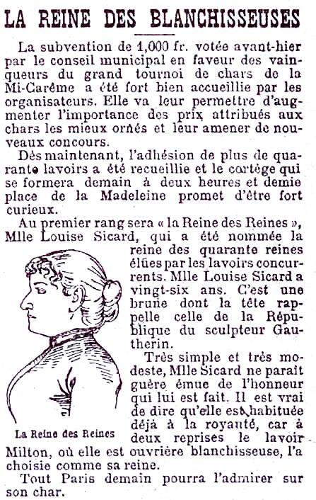 Article paru la veille du jeudi de la Mi-Carême 1891 avec le portait de la première Reine des Reines de Paris : Louise Sicard, Reine du lavoir Milton.